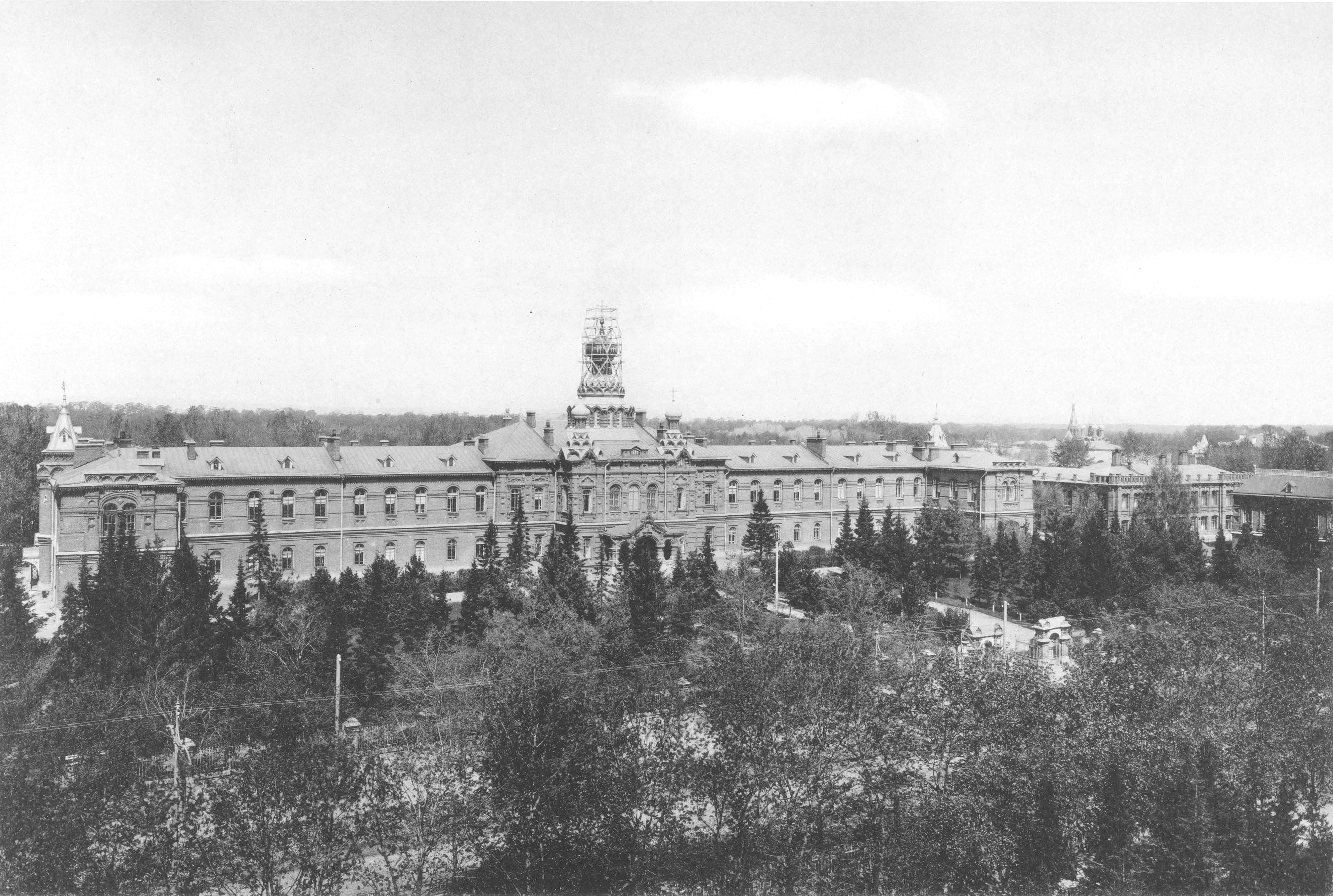 73. Больница имени бр. Бахрушиныхъ на СтромынкЪ. (Москва)